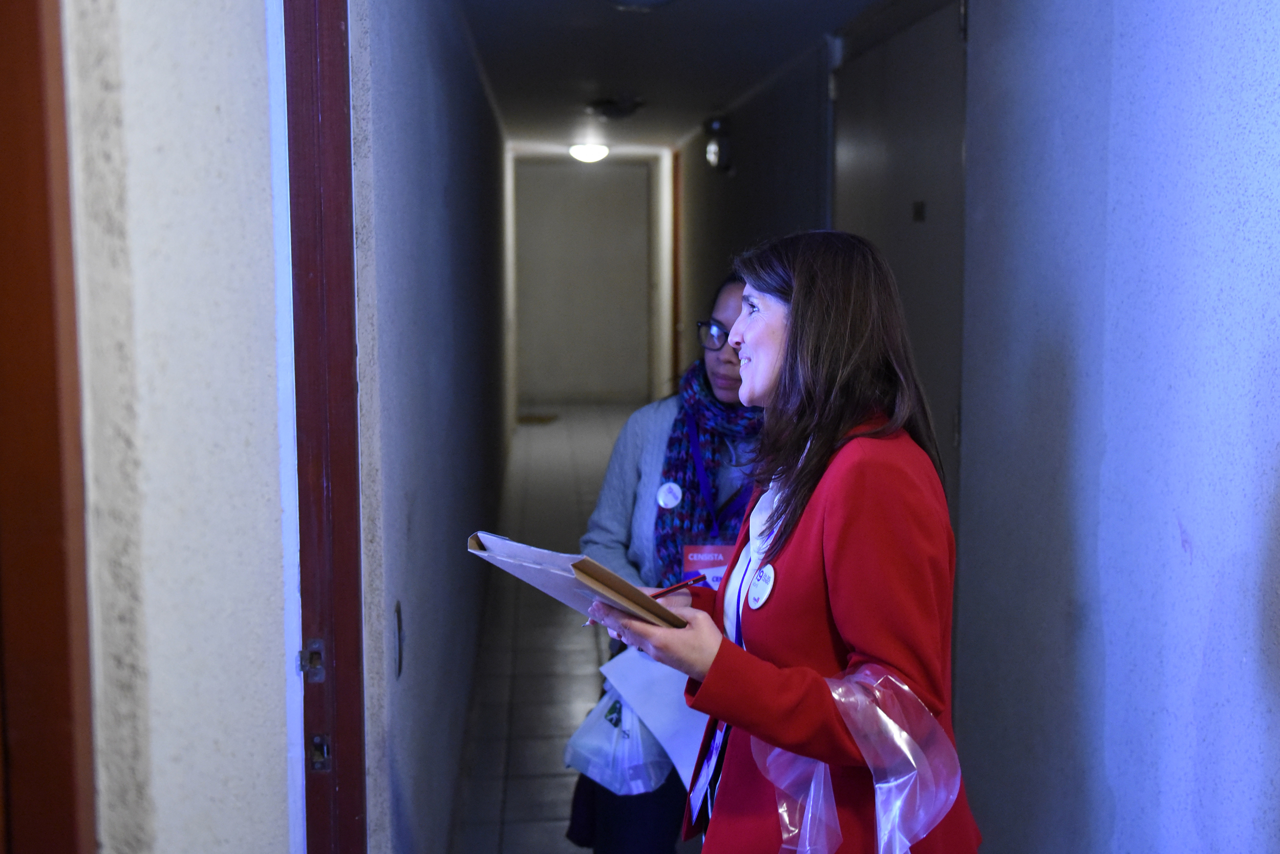 19 Abril 2017, Ministra Paula Narváez en vocería y luego se dirige a realizar censo en la comuna de Santiago.